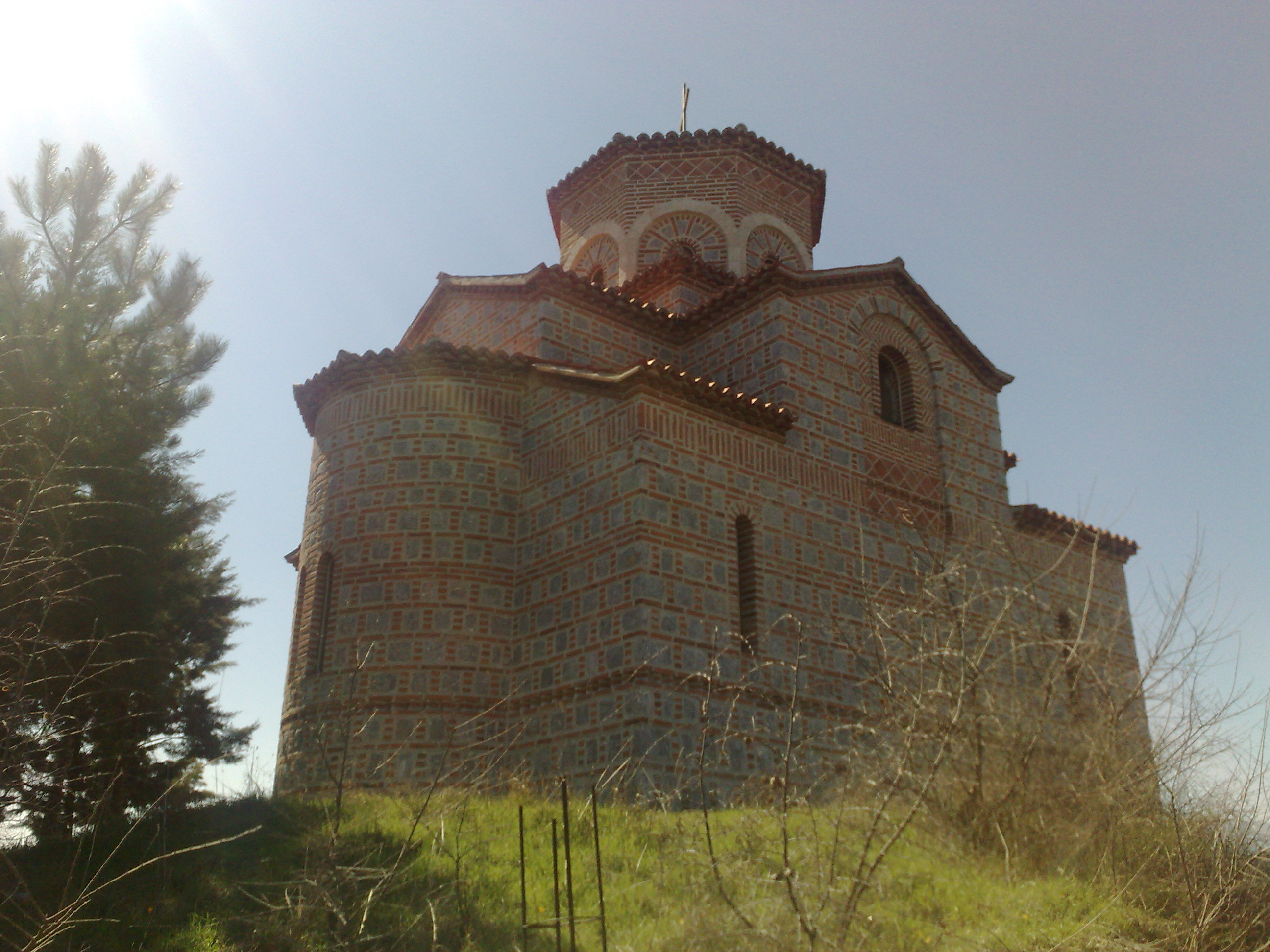 Црквата Свети Илија во село Таор